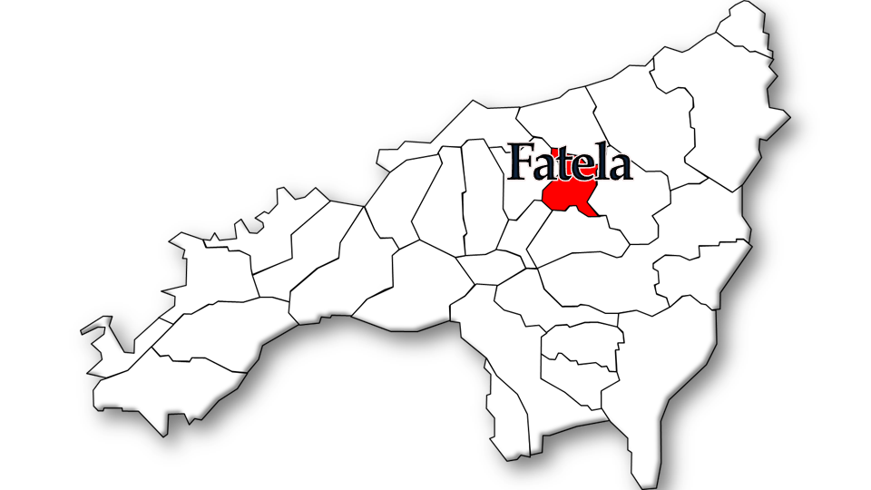 População